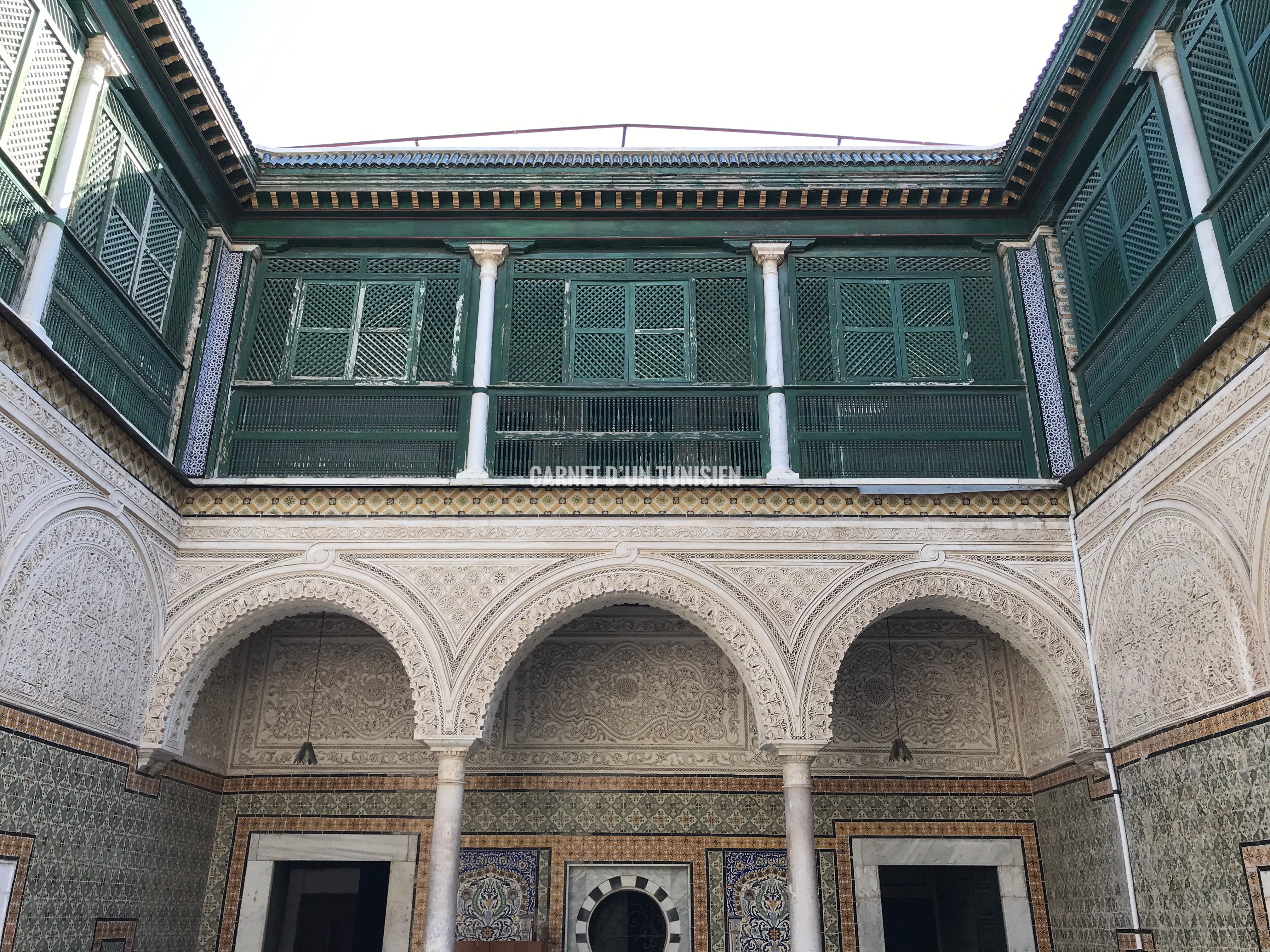 Dar el Monastiri, un ancien palais de la famille beylicale, situé à la rue el Monastiri à la médina de Tunis.